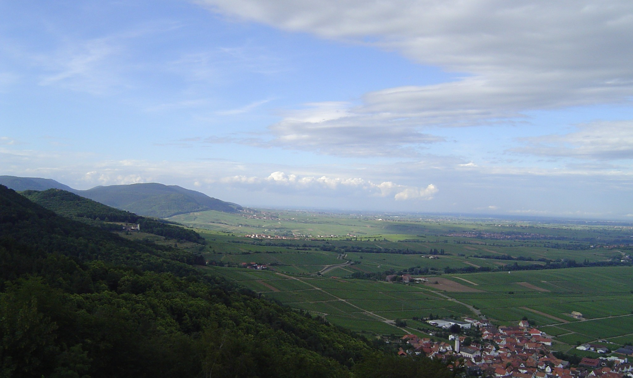 View of the Haardtrand from the Madenburg near Eschbach (Germany) / Blick auf den Haardtrand von der Madenburg bei Eschbach aus nach Norden